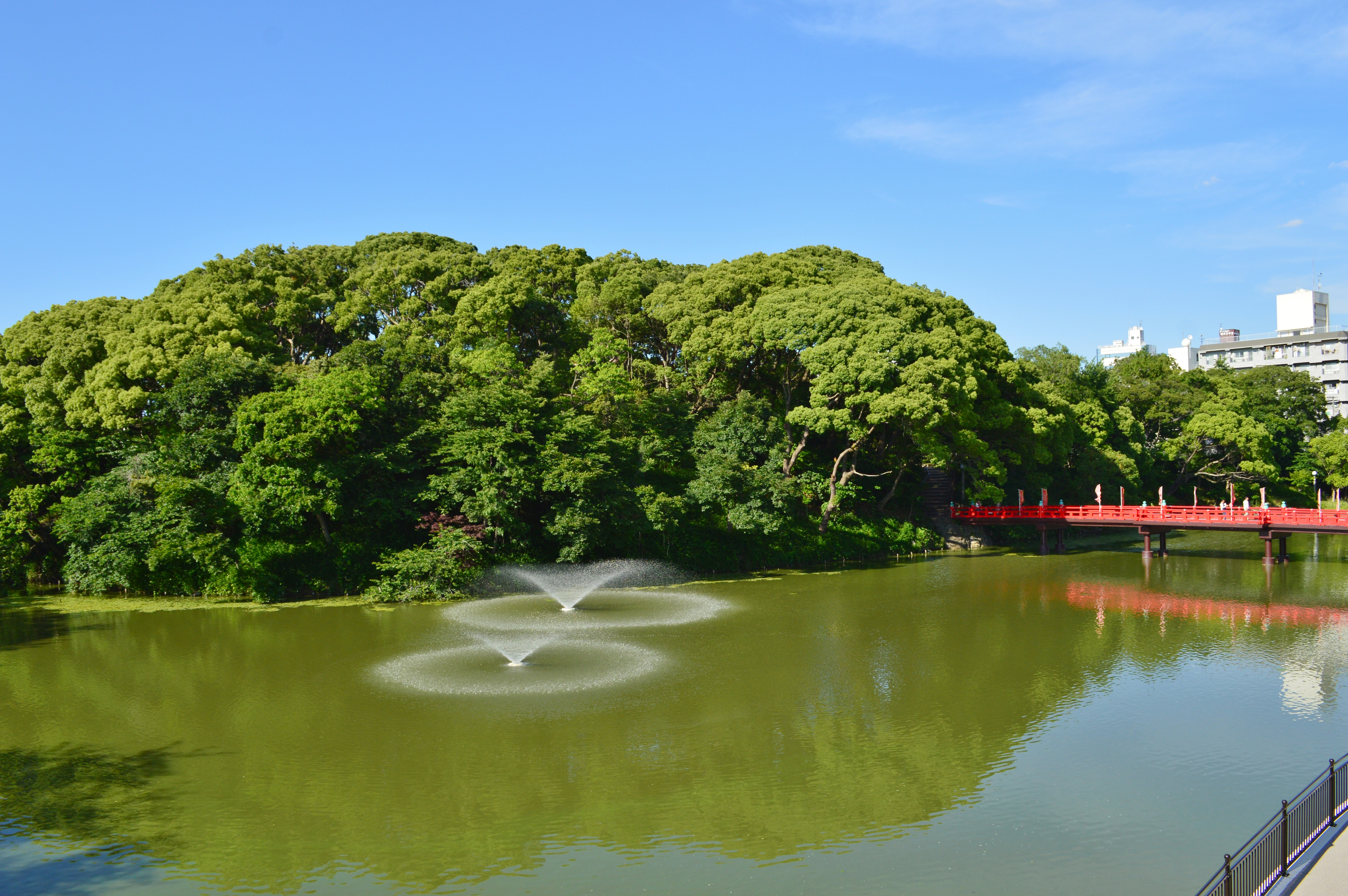 茶臼山 (大阪市) 全景